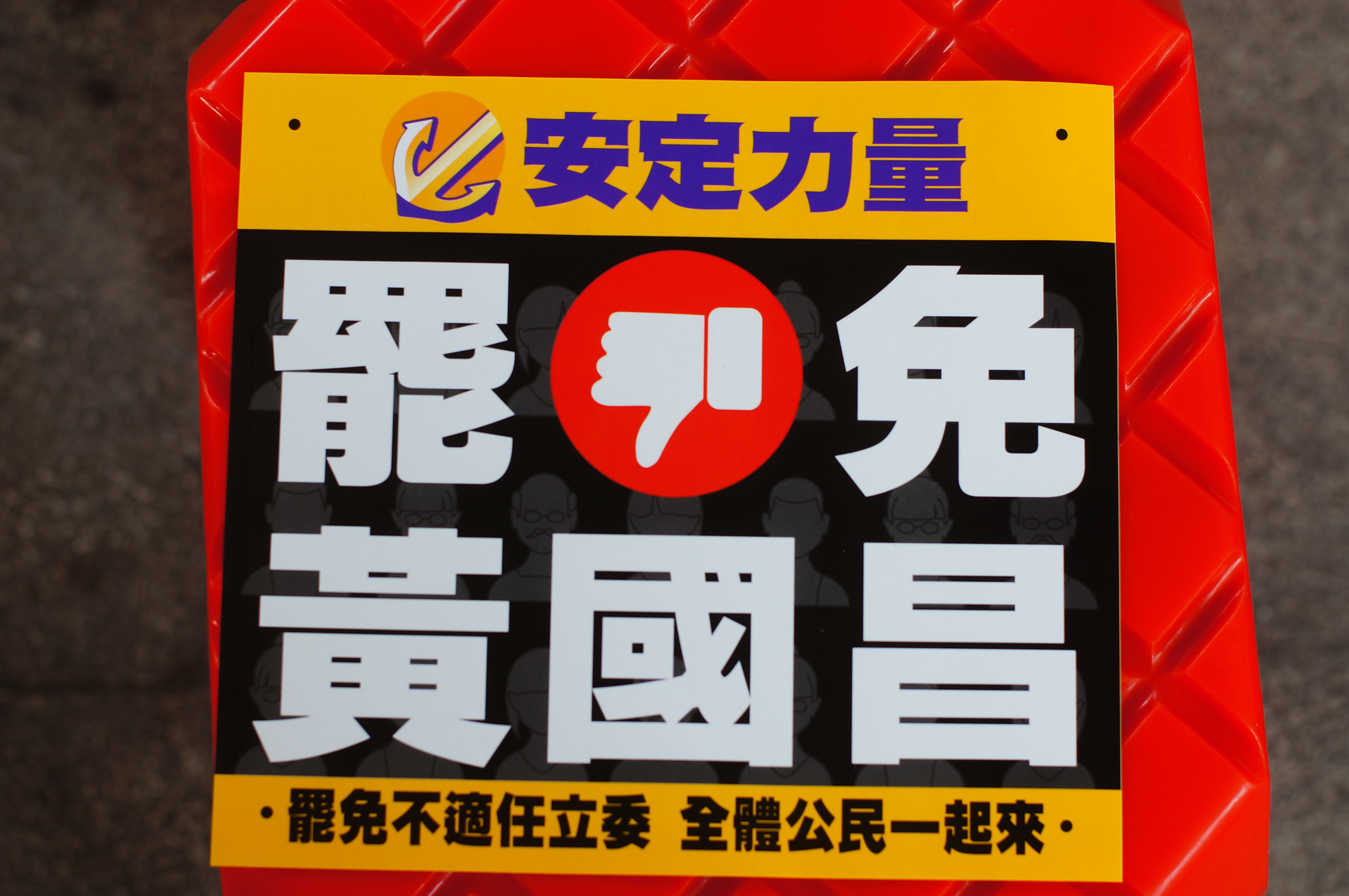 安定力量罷免黃國昌貼紙